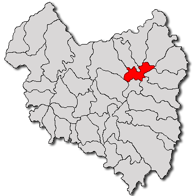 Categorie:Hărţi ale judeţului Covasna